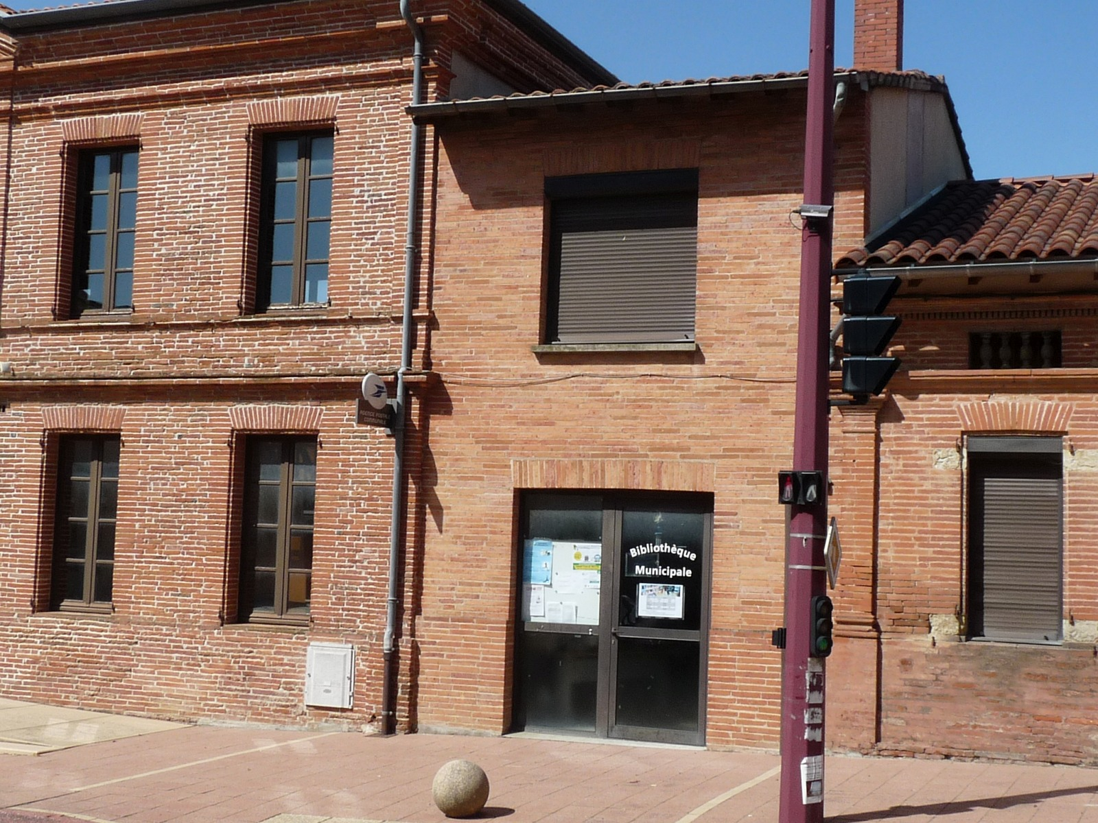 Bibliothèque municipale, Labastide-Beauvoir, Haute-Garonne, France